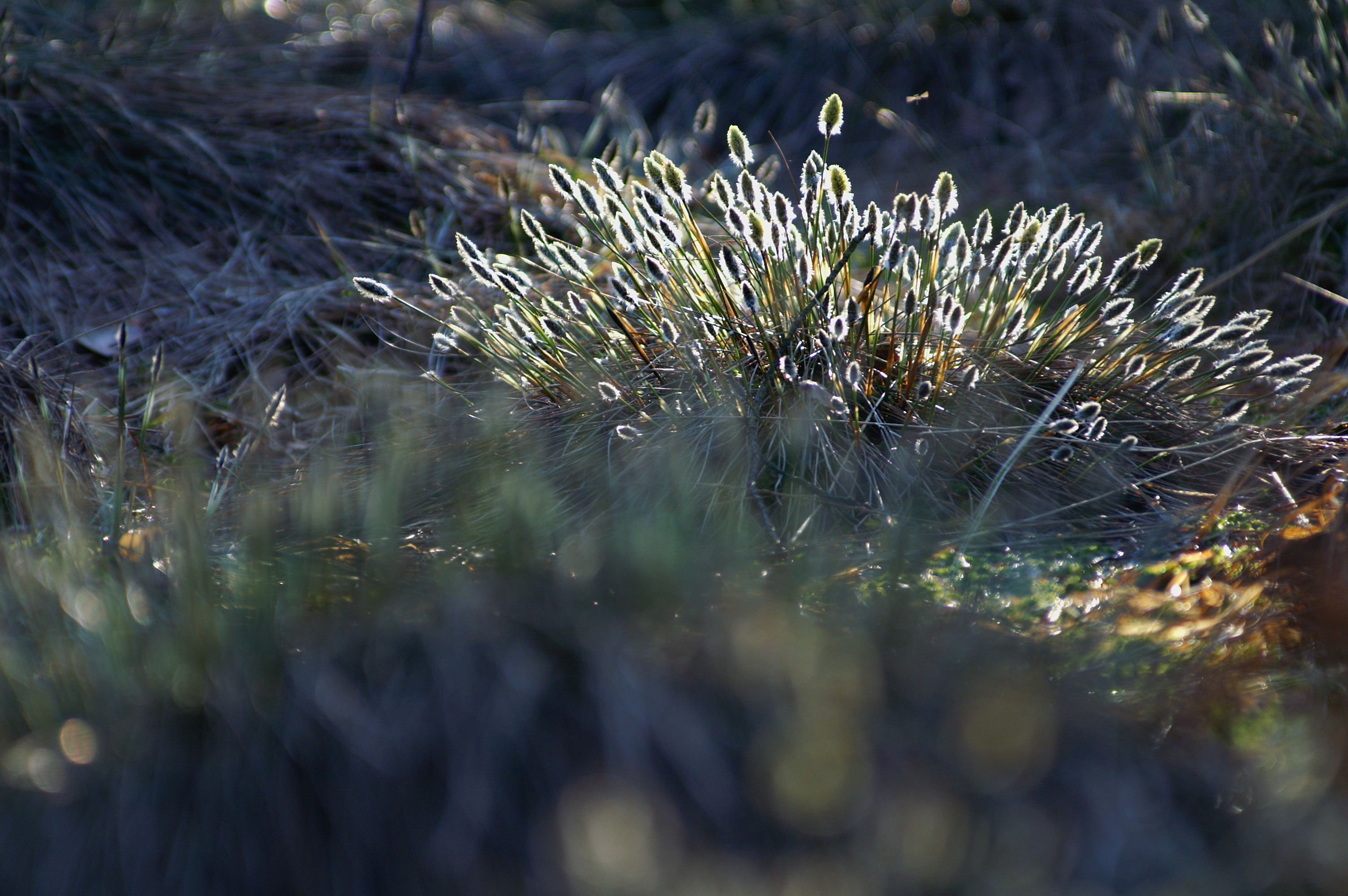 Blüte des Scheidigen Wollgrases (Eriophorum vaginatum) im Haspelmoor, Bayern, Deutschland.